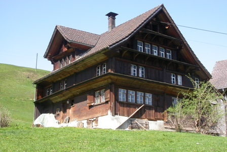 Haus, in dem Ulrich Bräker 1735 geboren wurde